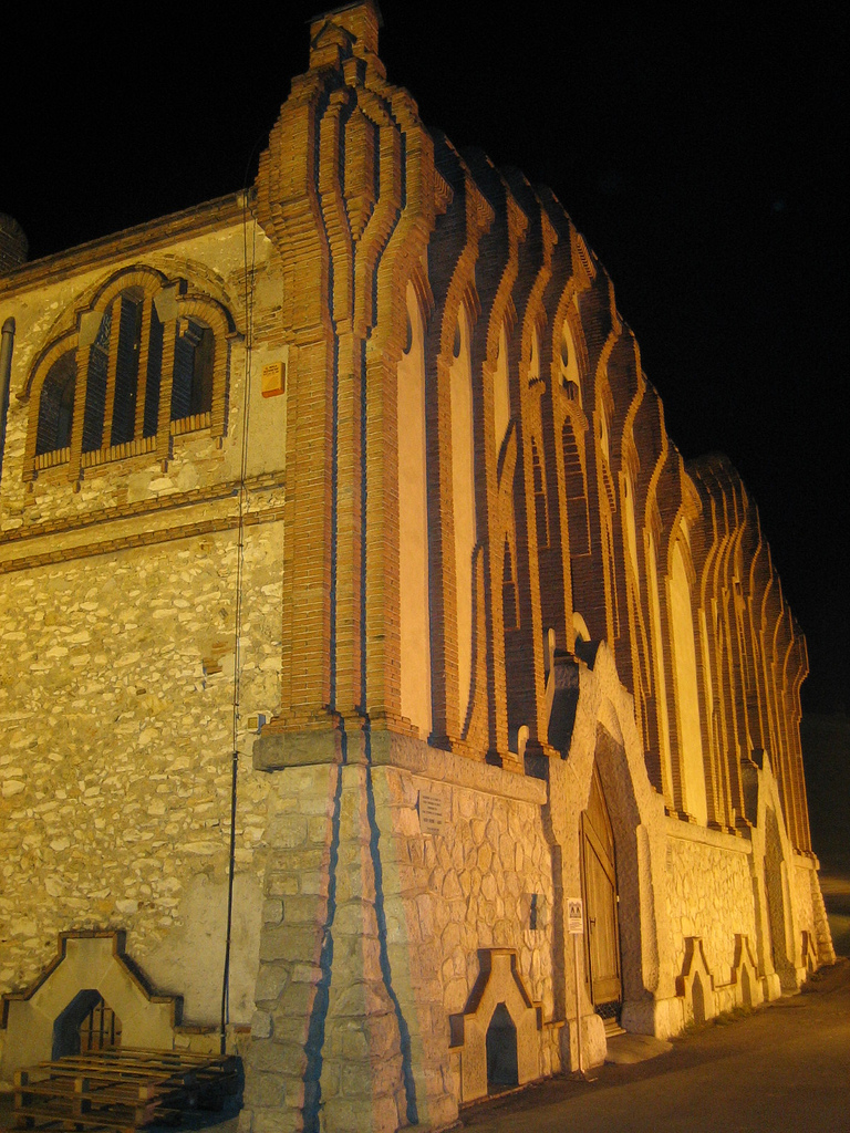 Celler Cooperatiu del Sindicat agrícola de Sant Isidre. Projectat per Cèsar Martinell. Construït el 1919